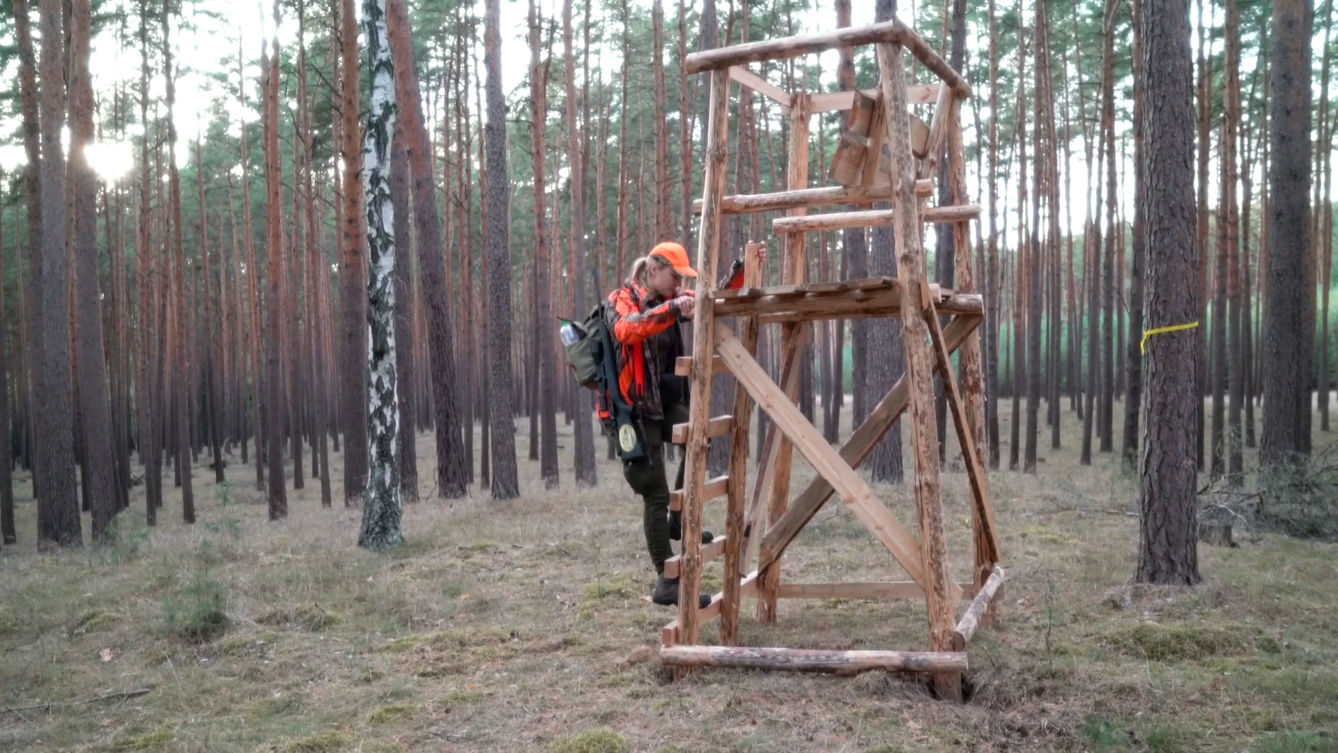 (Jung-)Jägerin Lilly Schulte beim Aufbaumen auf den Ansitz / Drückjagdbock in einem Wald nahe Magdeburg, Sachsen-Anhalt, 2019